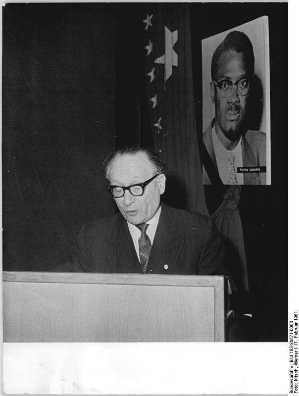 Berlin, VdJ-Fotoausstellung "Der Tag begann" Zentralbild Krisch 17.2.1961 "Der Tag begann" Ausstellung des VDJ gegen Kolonialismus "Der Tag begann - Freiheit und Unabhängigkeit für alle Völker" ist das Motto einer Ausstellung gegen den Kolonialismus, die der Verband Deutscher Lournalisten (VDJ) am Freitag, den 17.2.1961, im Ausstellungszentrum am Berliner Bahnhof Friedrichstrasse der Öffentlichkeit übergab. Die Ausstellung soll das Gefühl der Solidarität für den Freiheitskampf der afrikanischen Völker stärken. Sie verkörpert einen Teil der großen Afrika-Solidaritätsaktien der DDR-Journalisten. (Näheres siehe ADN-Meldung Nr. 120-710 und 121-711 vom 17.2.61) UBz: Vorsitzender des Verbandes der Deutschen Journalisten Dr. Georg Krausz bei seiner Eröffnungsansprache. Abgebildete Personen: Krausz, Georg Dr.: Vorsitzender des Verbandes der Deutschen Journalisten, DDR